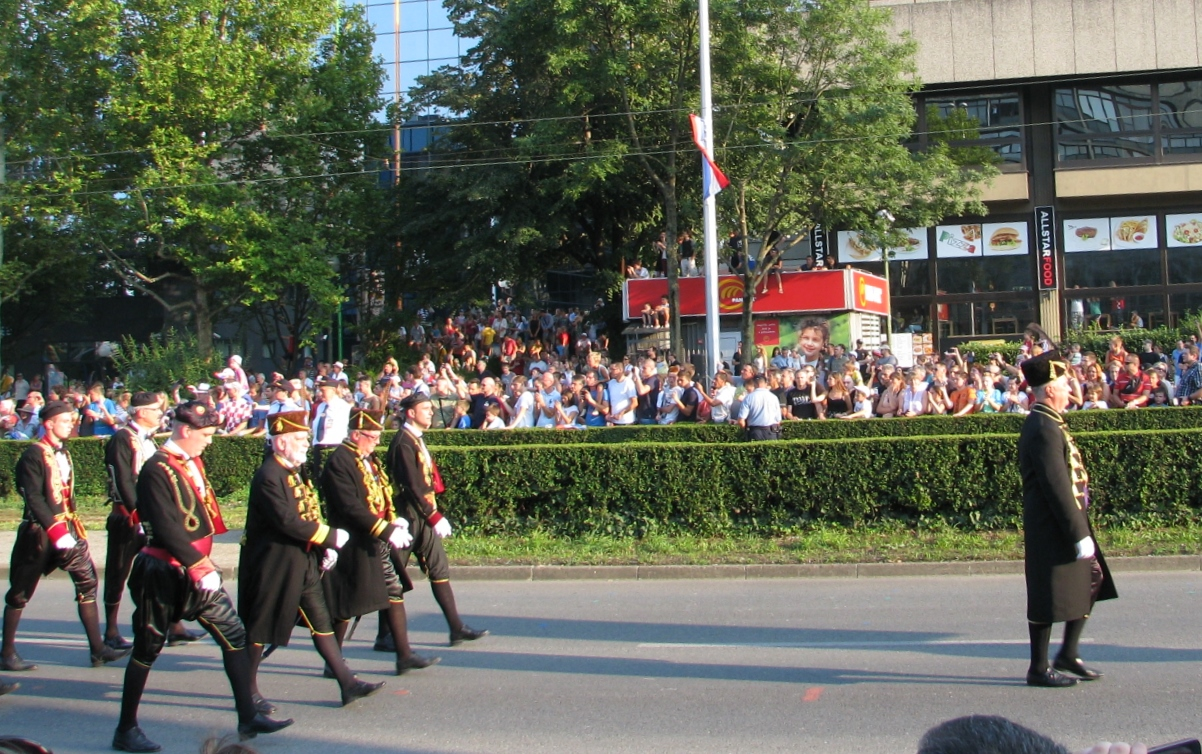 Hrvatska bratovština Bokeljska mornarica 809. na svečanom mimohodu u Zagrebu, 4. kolovoza 2015.